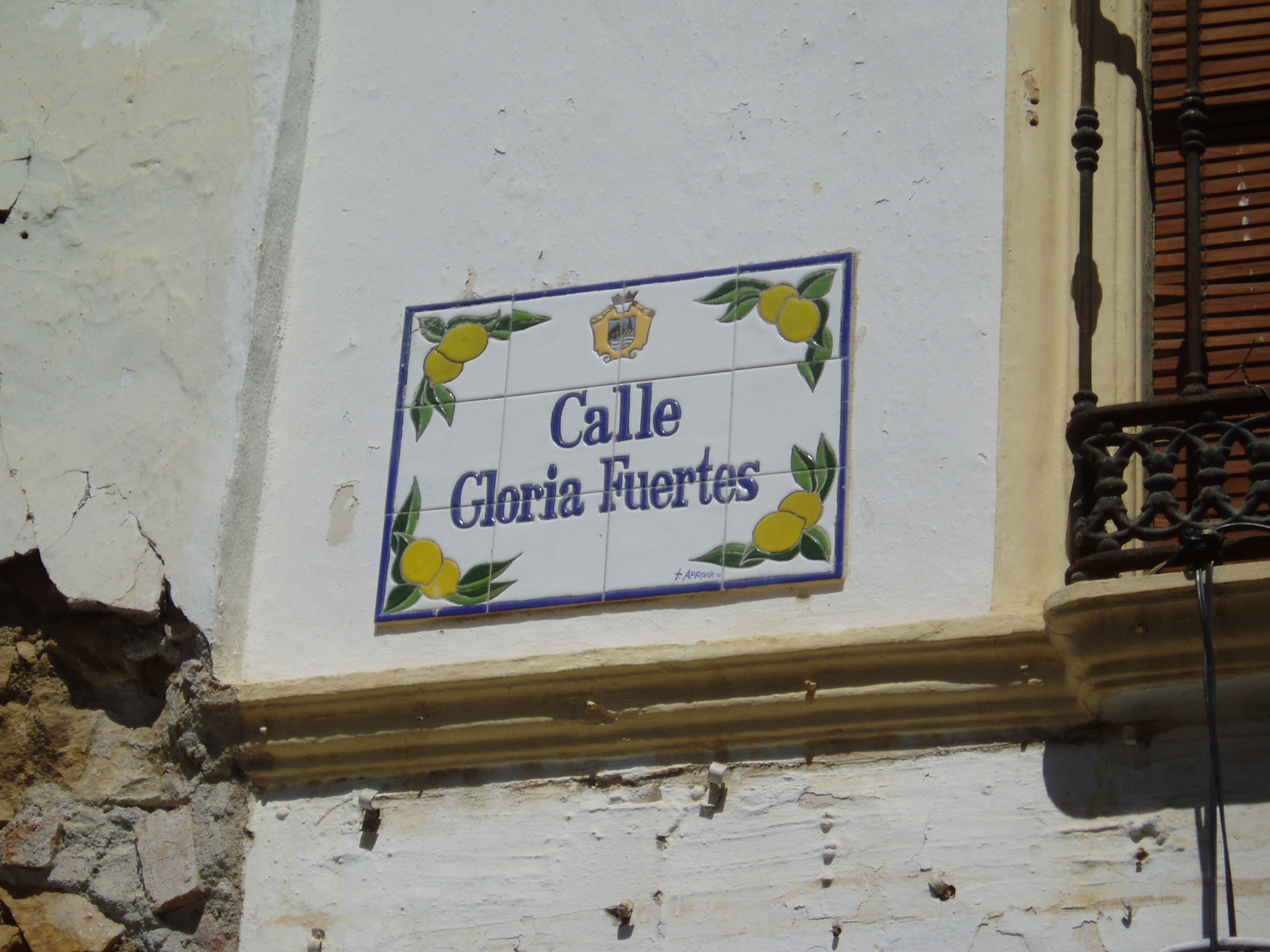 Calle de Gloria Fuertes en Estepona(Málaga).